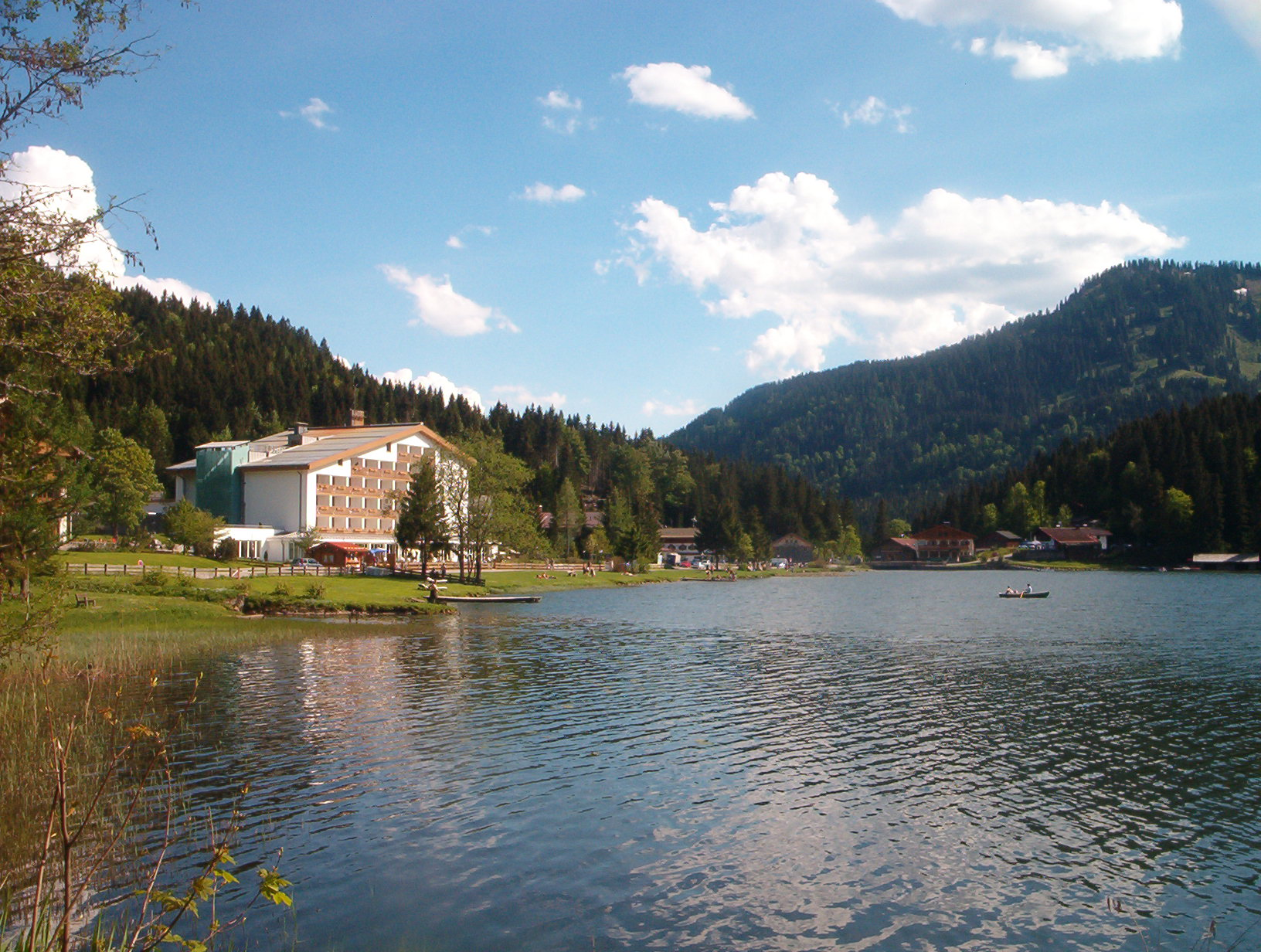 Germany